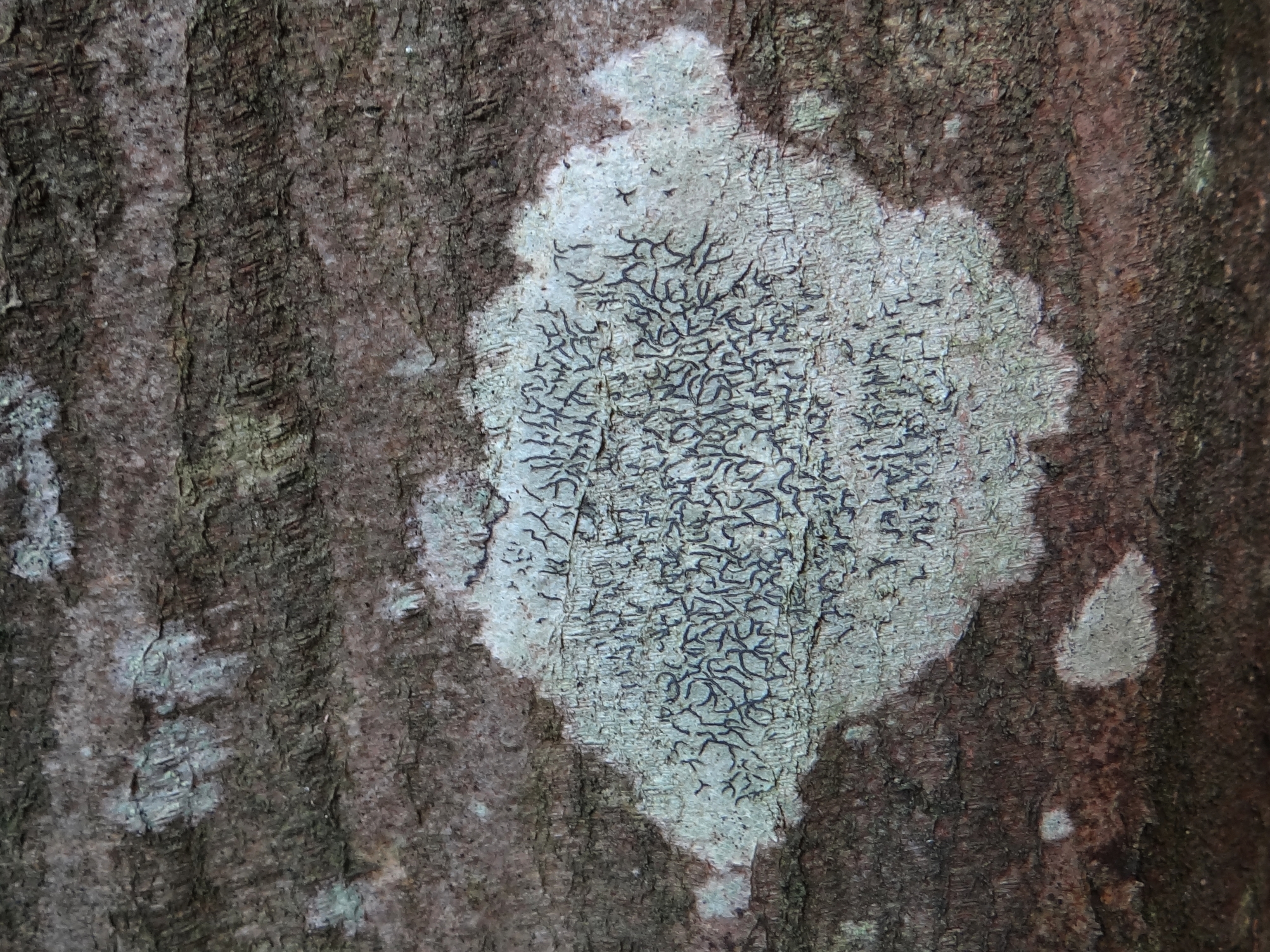 Graphis scripta (location: Poland, Kamionna w województwie małopolskim)